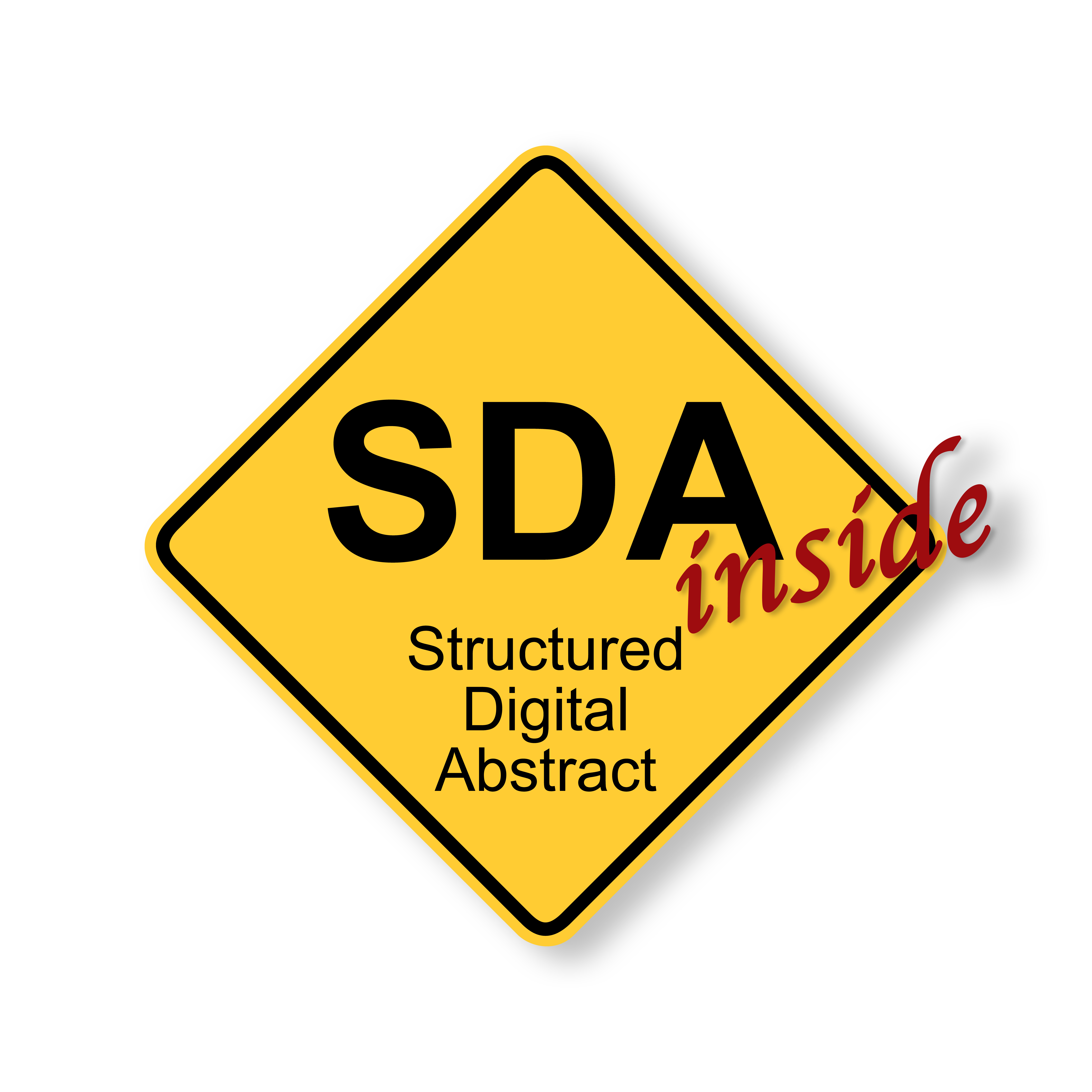 Structured digital abstract (SDA) logo